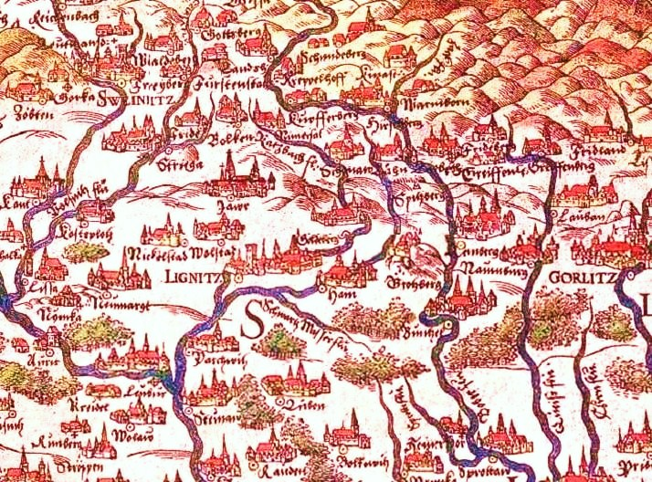 Południowy zachód Dolnego Śląska na mapie z 1561 r.